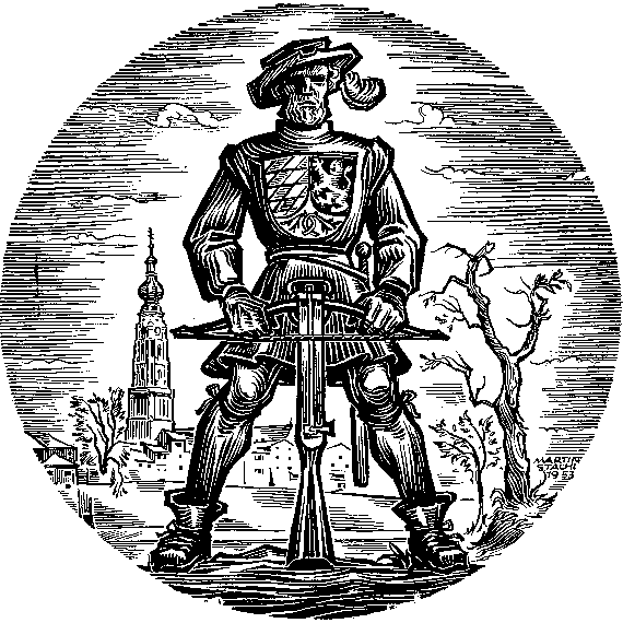 Logo der Privilegierte Schützengesellschaft Braunau 1403